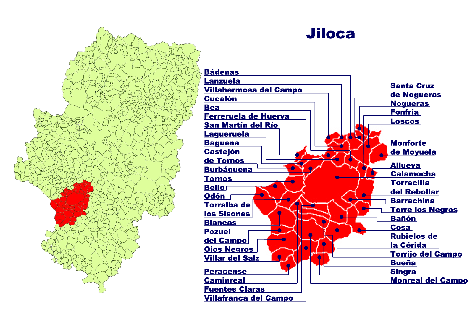 Comarca del Jiloca Creado el 11.11.2005 por Ecelan en base a Image:Aragon municipalities.png